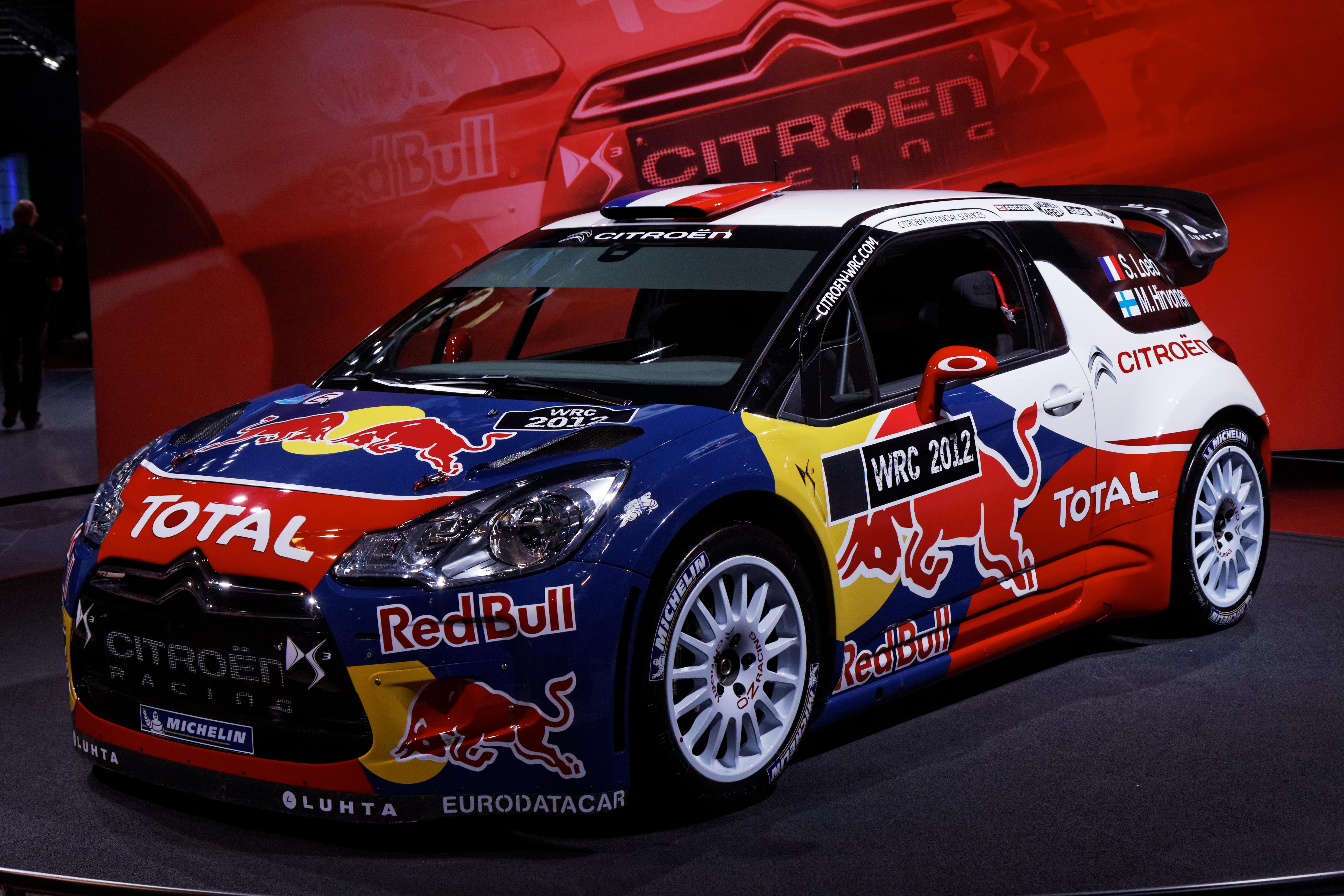 Une Citroën DS3 WRC présentée lors du Mondial de l'Automobile de Paris 2012.